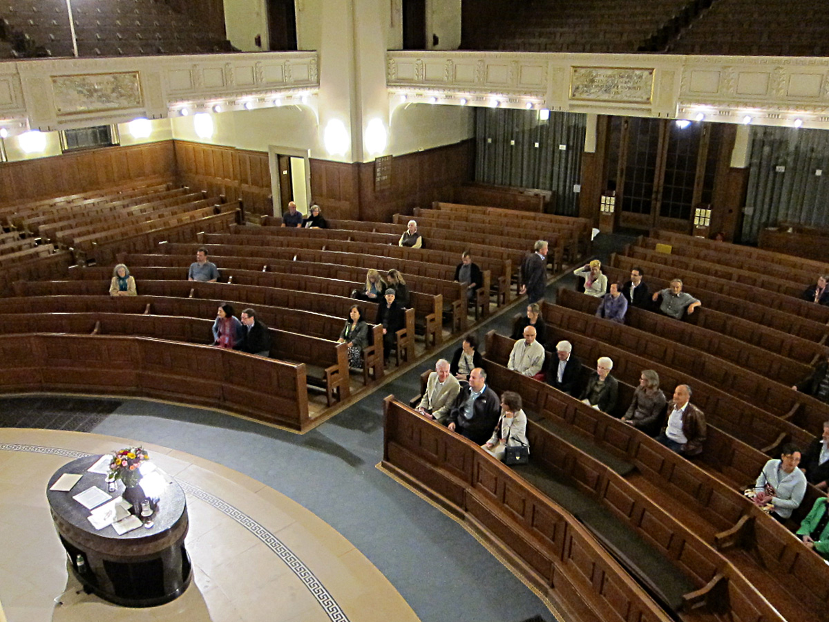 Kirchenraum der Kreuzkirche Zürich-Hottingen mit radial angeordneten Sitzbänken